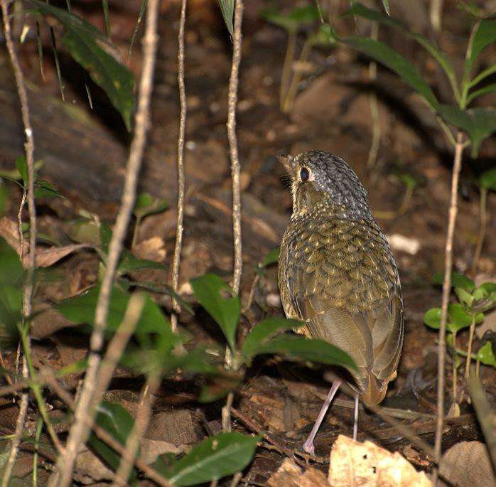 Variegated Antpitta (Grallaria varia) Parque Estadual da Cantareira - São Paulo-SP " É praticamente desconhecida do público em geral e, por isso mesmo, foi escolhida como símbolo do laboratório de Ornitologia da Universidade Federal de Viçosa %u2013 como um alerta sobre os milhares de espécies que estão sendo perdidas no mundo sem que as pessoas se dêem conta. Juntamente com pelo menos outras 27 espécies de aves, o tavacuçu foi extinto na região de Viçosa (clique aqui e faça o download da publicação) e em grande parte do estado de Minas Gerais. Infelizmente, a maioria das pessoas não faz a mínima idéia desse estado de deterioração da nossa avifauna. O tovacuçu é uma espécie sensível à destruição e fragmentação florestal, um problema mundial para a conservação da biodiversidade. Sua voz marcante e a dificuldade em ser vista torna nossas florestas ainda mais atraentes e espetaculares " Fonte